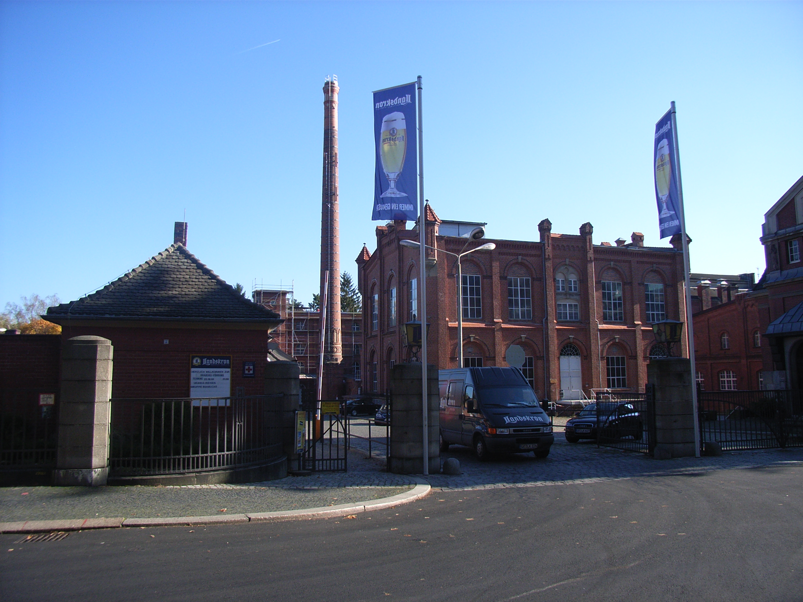 Landskronbrauerei, Görlitz